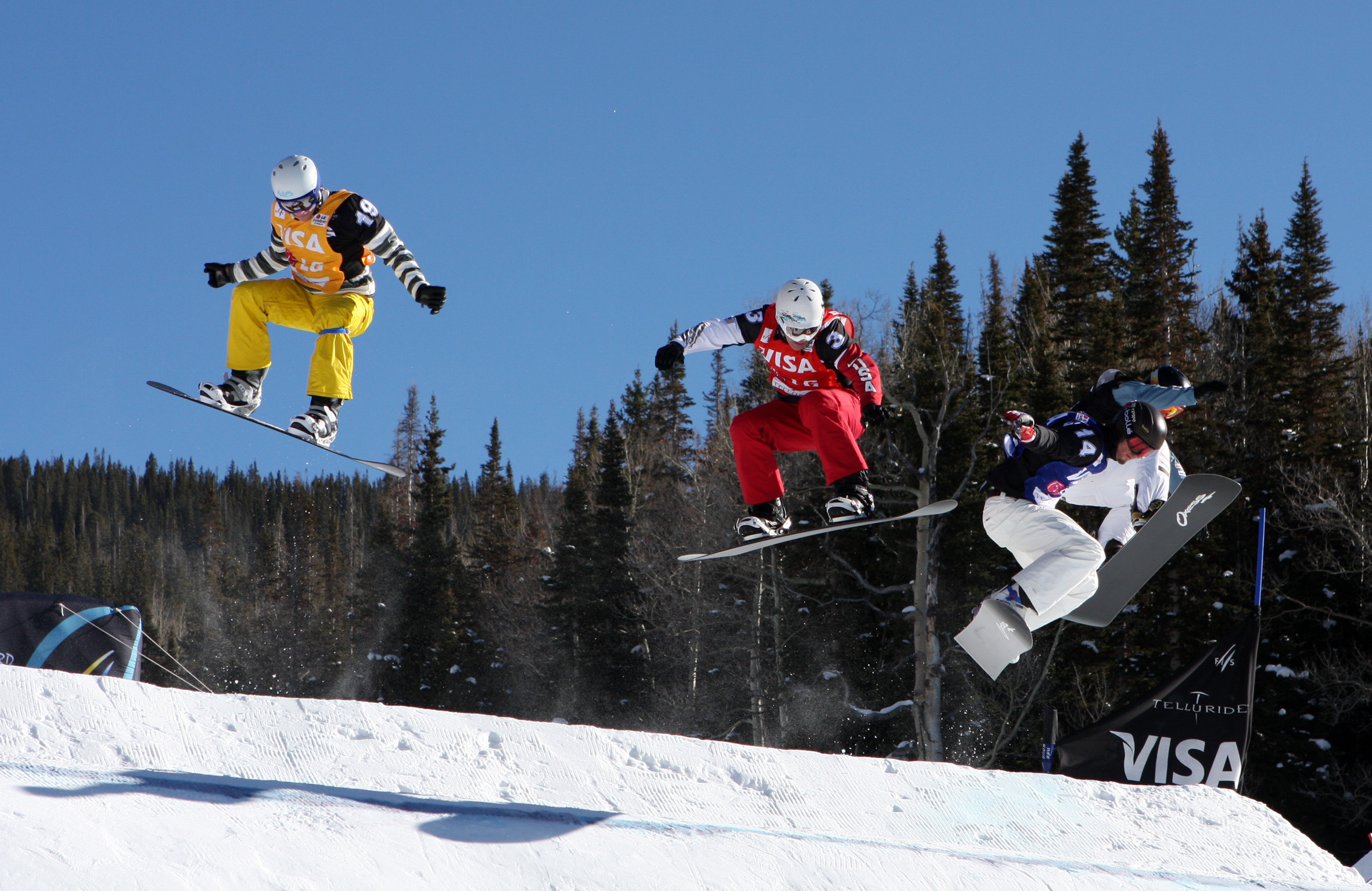 Telluride_SBX_Eighth_Final_Men_Kevin_Hill_CAN_Nick_Baumgartner_Pierre_Vaultier_FRA_Fabio_Caduff_SUI